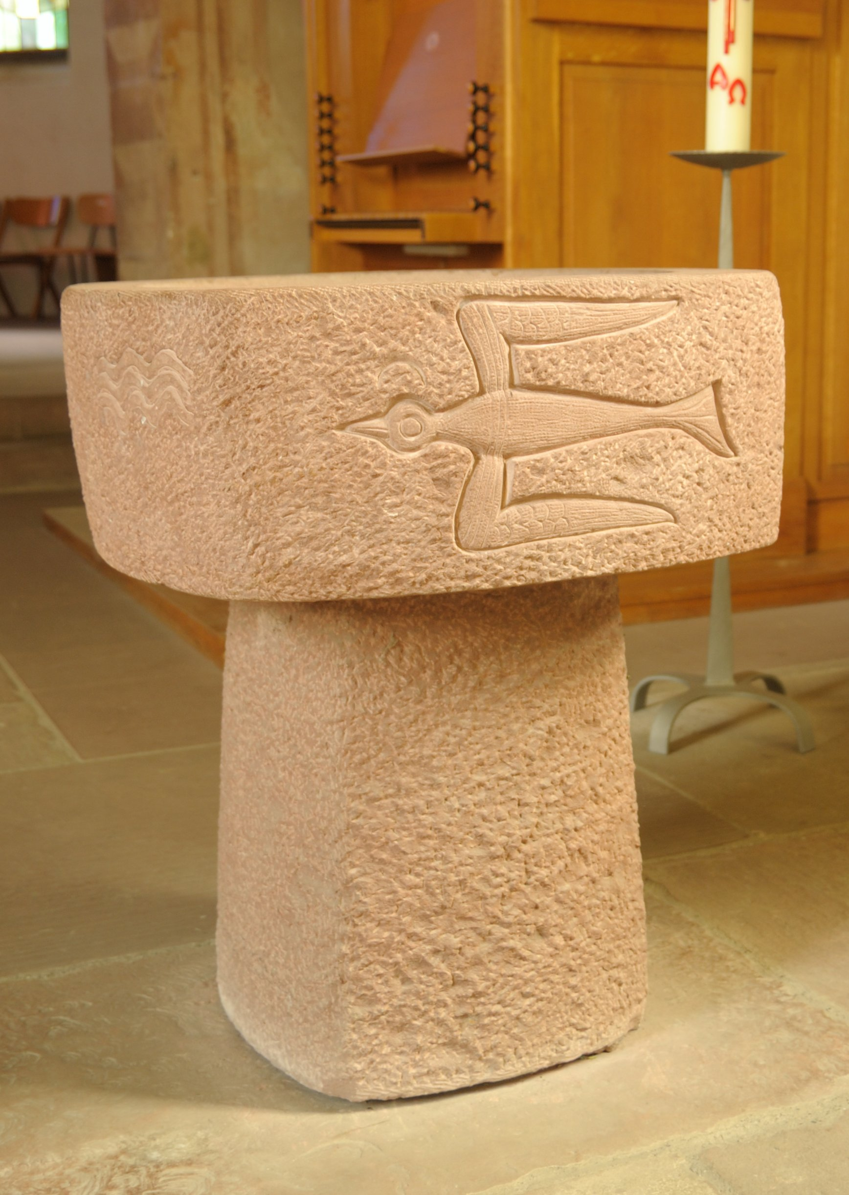 Peterskirche Blansingen: Taufstein